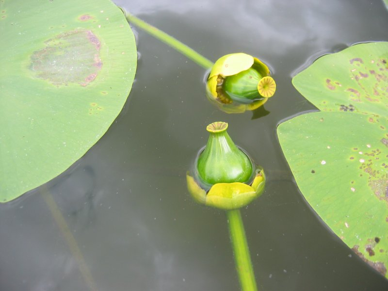 Gelbe Teichrose Nuphar lutea, Müritz-Gebiet